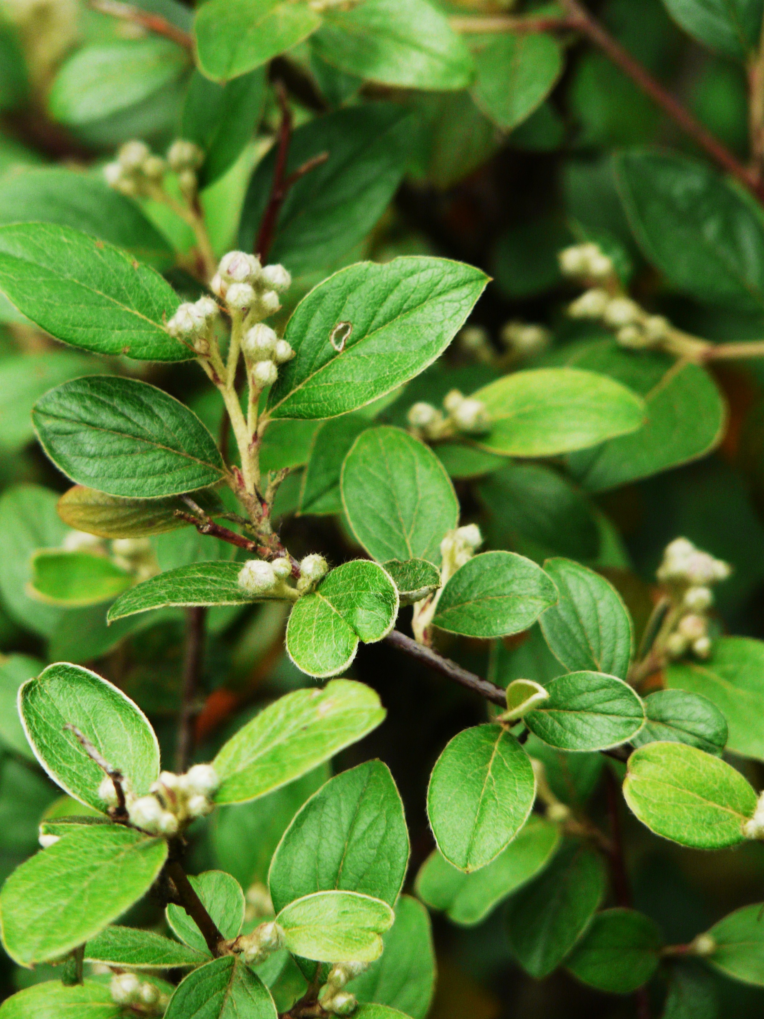 Feuilles de Cotonéaster de Franchet (Cotoneaster franchetii), Dordogne, France